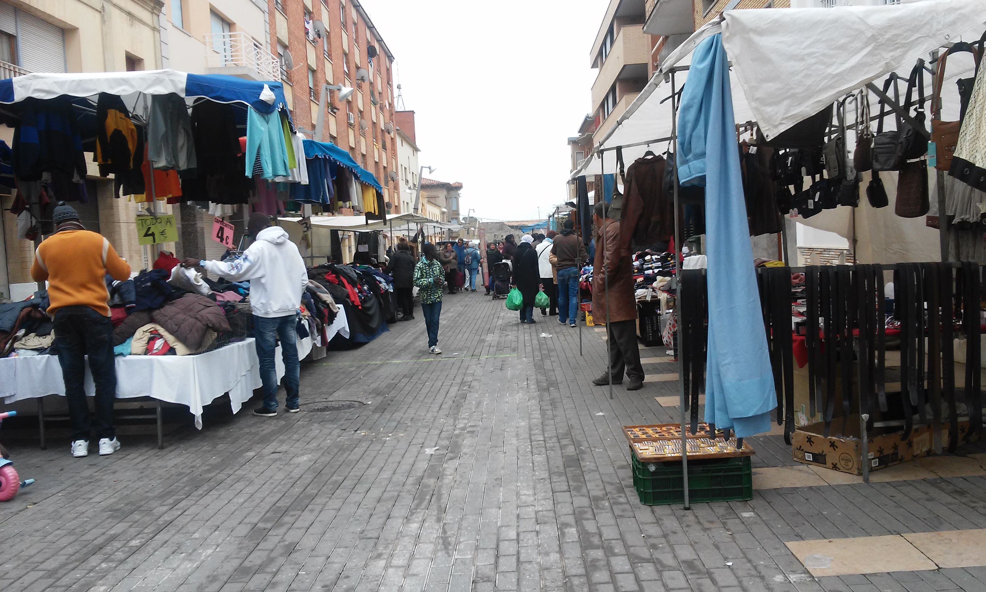 El Raval de Sant Jaume (Calaf), el dia 14 de novembre de 2015, un dia de mercat.